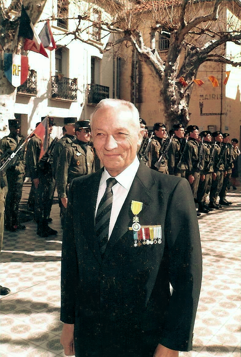 Le sénateur maire André DAUGNAC